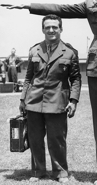 Giovanni Gozzi in Los Angeles in 1932.